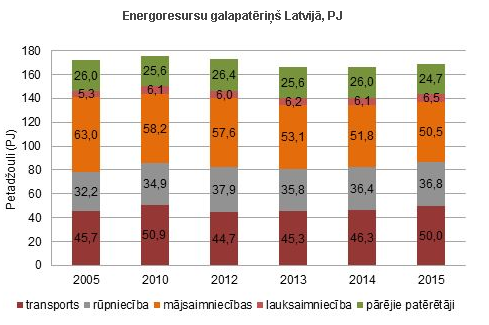 Energoresursu patēriņš Latvijā dažādās nozarēs no 2005.gada līdz 2015.gadam